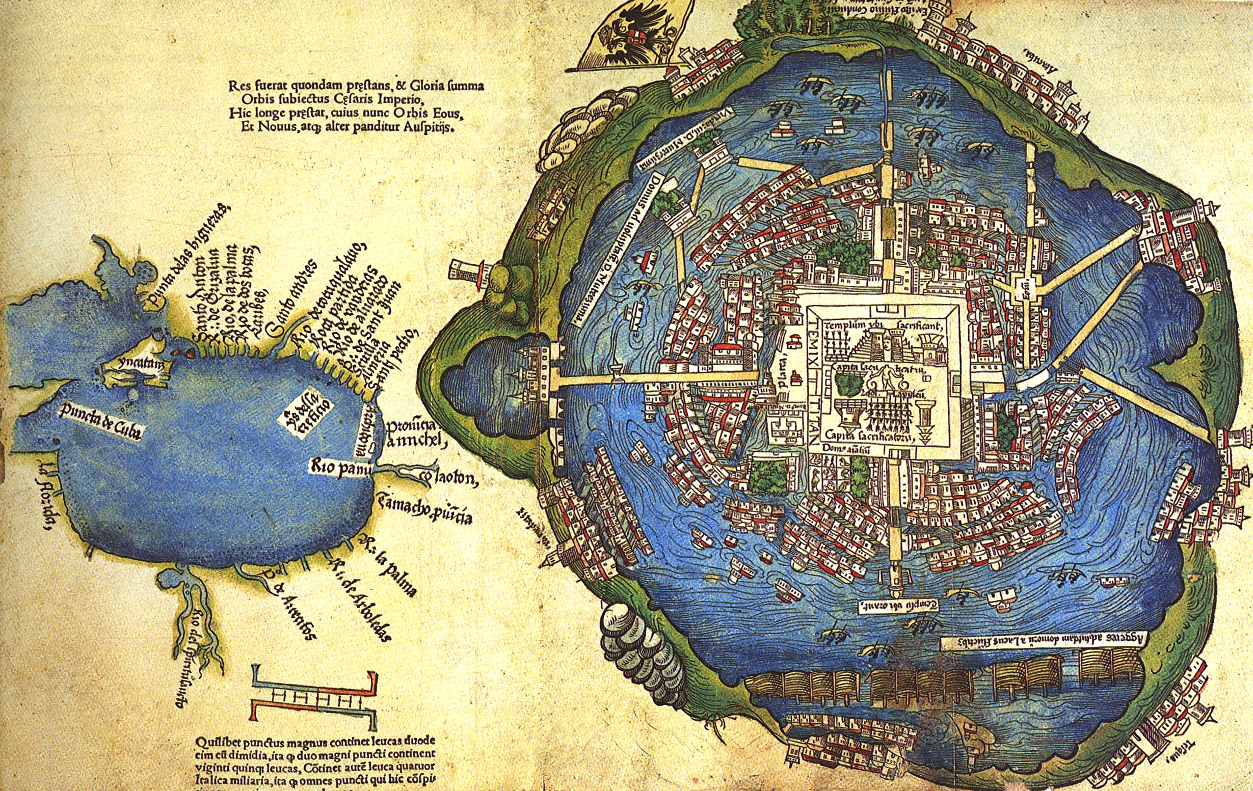 Карта-схема Мехико-Теночтитлана - столицы ацтеков. Опубликована в латинском издании "Реляций" Кортеса (Нюрнберг, 1524), считается, что составлена самим Кортесом на основе материалов индейских писцов